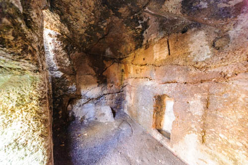 Hahnweilerhof Eremiteklause 5